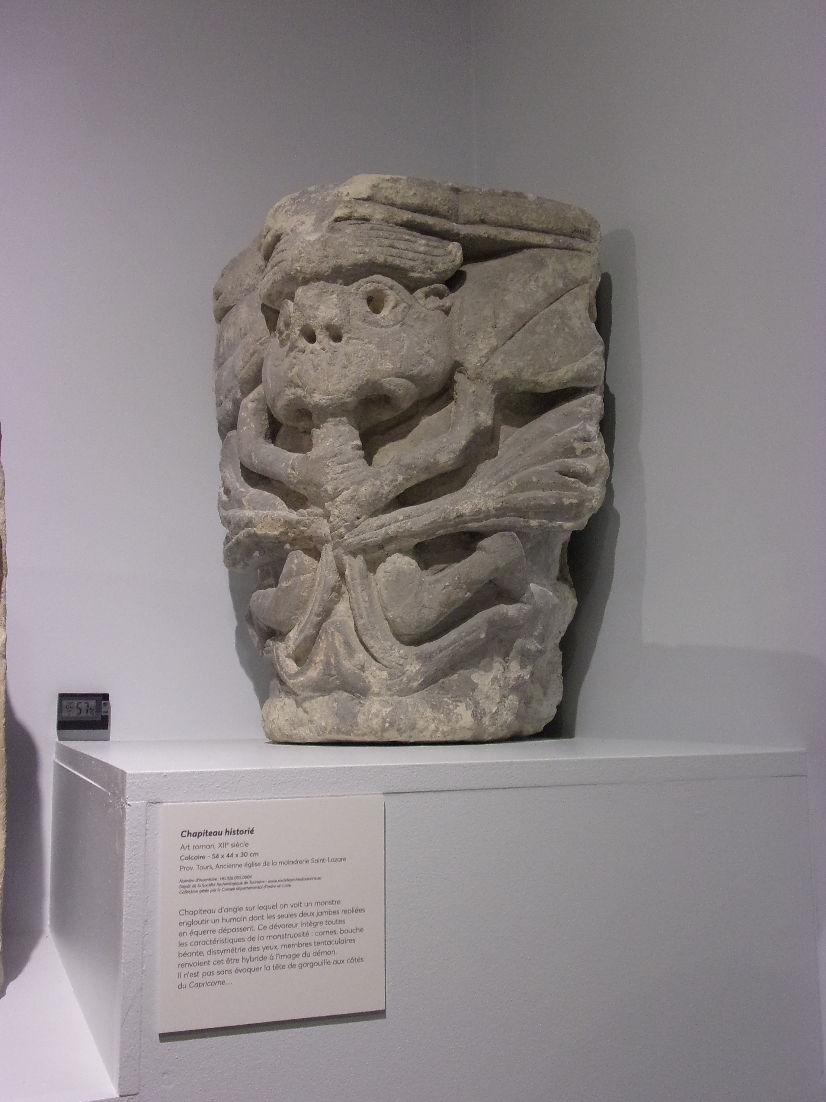 Chapiteau roman de l'ancienne maladrerie Saint-Lazare de Tours. Collection Société archéologique de Tours en dépôt à l'écomusée du Véron.